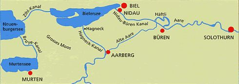 Zustand nach Juragewässerkorrektion. Nachzeichnung der Originalunterlagen von 1868, nun GNU FDL